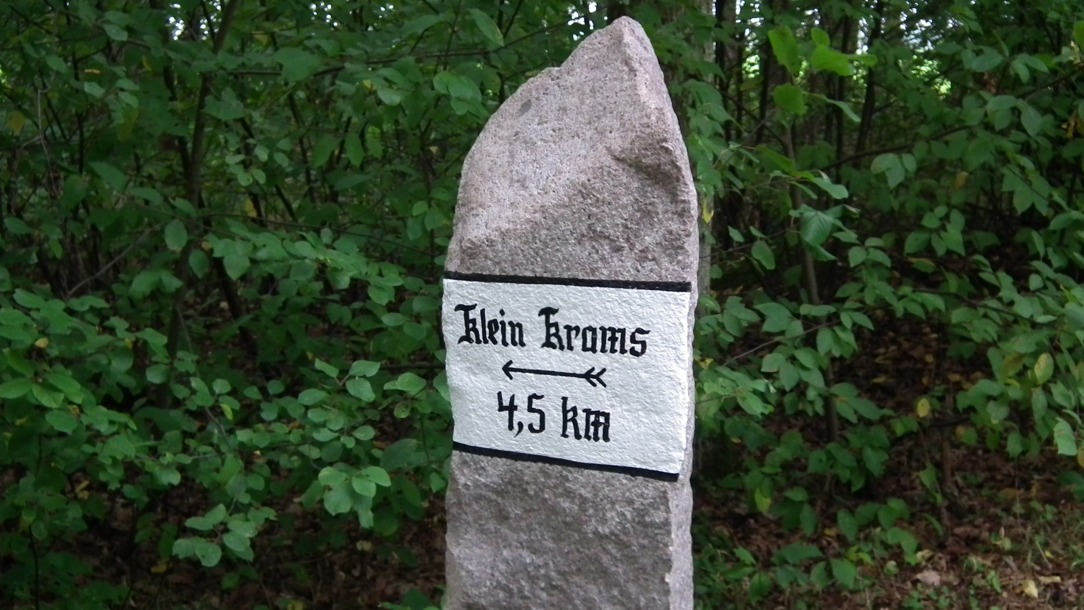 Wikipedia, Liste der Baudenkmale in Göhlen - Mecklenburg-Vorpommern, Landkreis Ludwigslust-Parchim, Amt Ludwigslust-Land, Nr. 6, Waldweg nach Klein Krams, Wegweiserstein. Dieser Wegweiserstein am Waldrand außerhalb des Ortes wird zumeist übersehen. Die Farben sind frisch - jedoch wurde eine Kilometerangabe ergänzt. Statt dieses Steines wird oftmals der (gar nicht in der Denkmalsliste aufgeführte) Stein im Ort gezeigt. Dieser Wegweiserstein ist ein Beispiel dafür, dass die alten Steine eine neue Aufmerksamkeit finden.